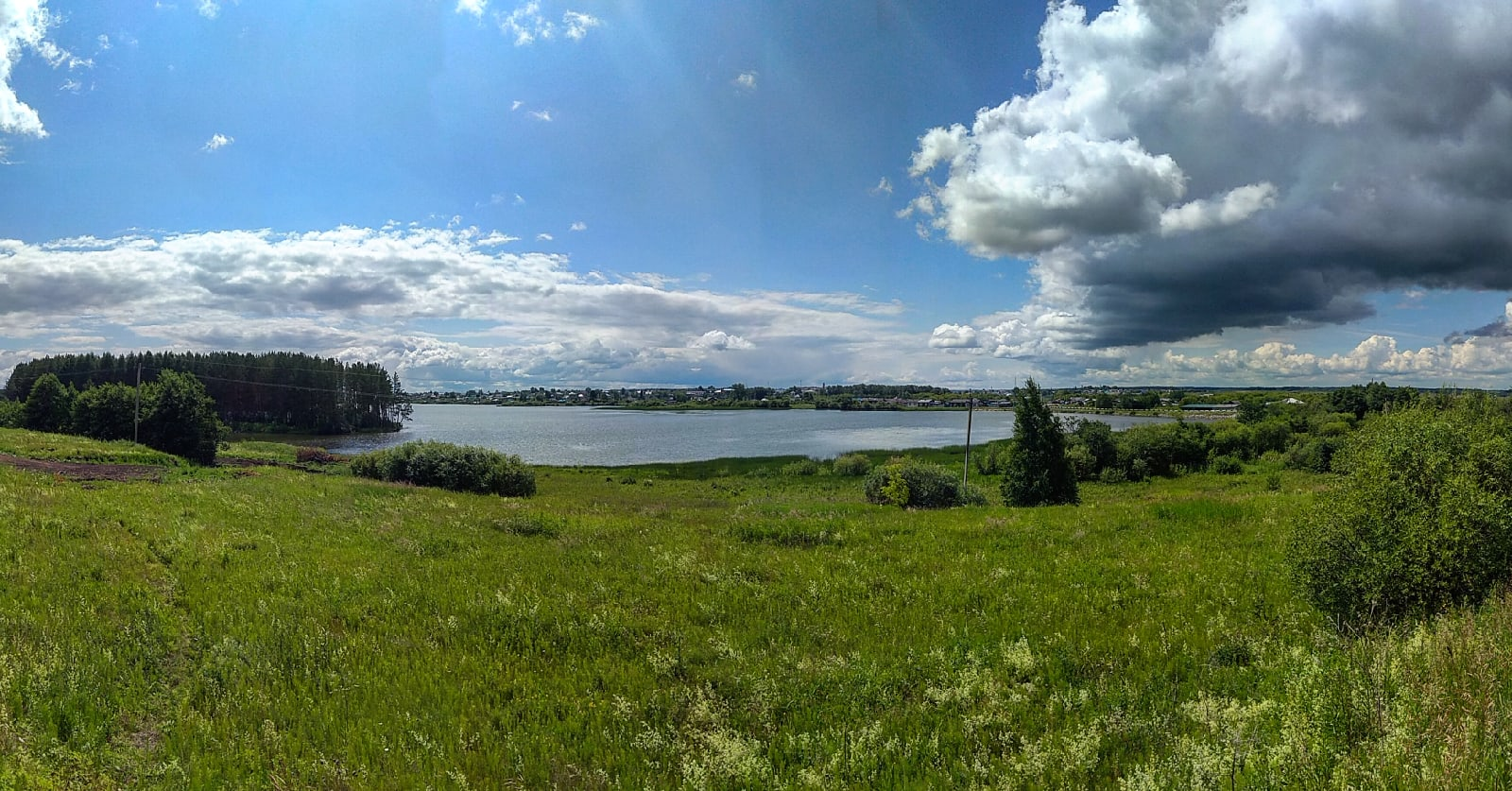 Вид с Баитовой горы на пруд и село